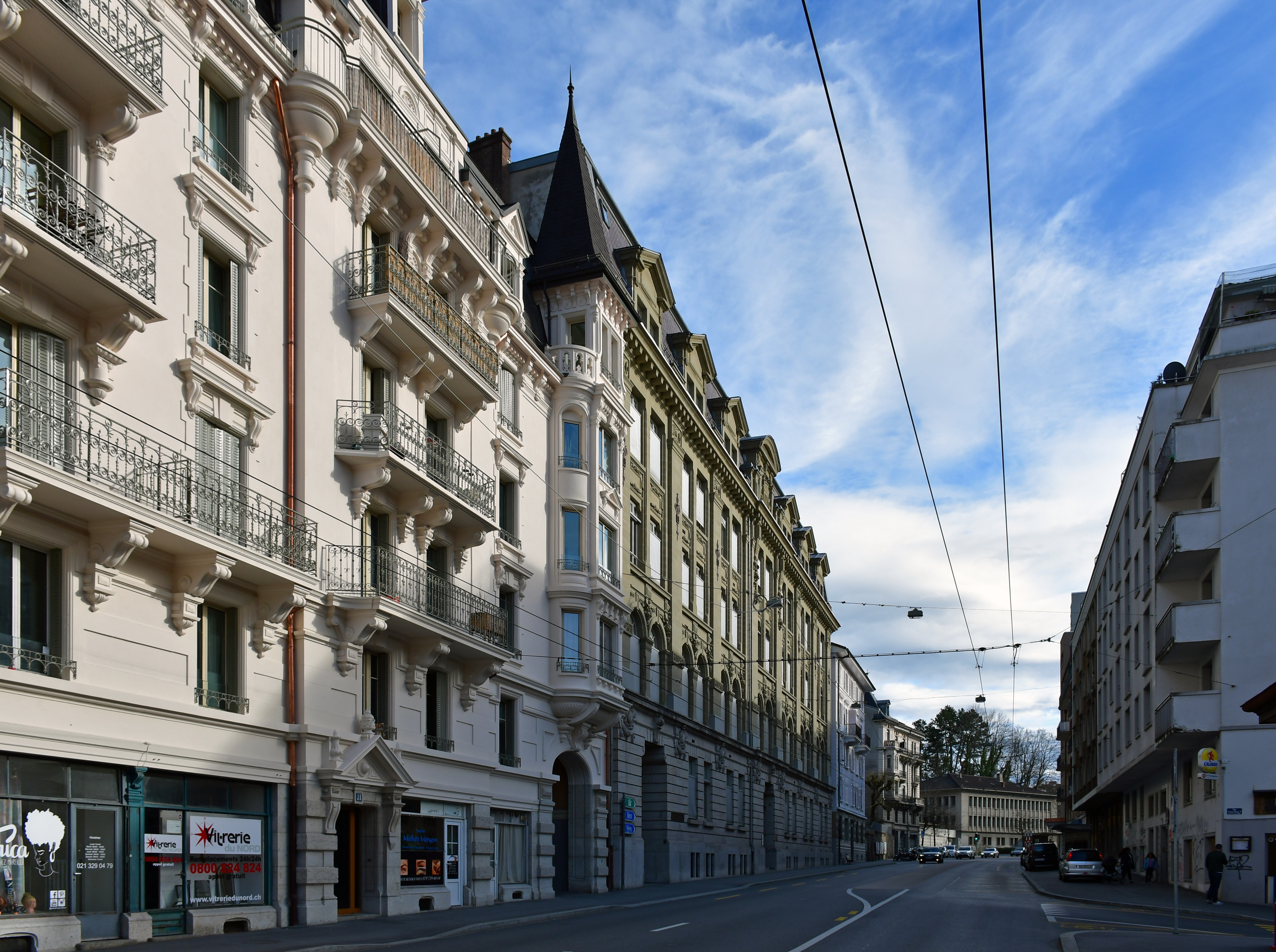 La rue César-Roux, à Lausanne (Suisse), vue du nord.